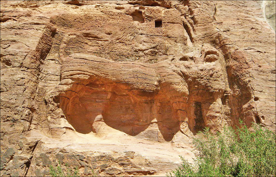 Vestiges de pierre de la Fontaine du Lion à Pétra.